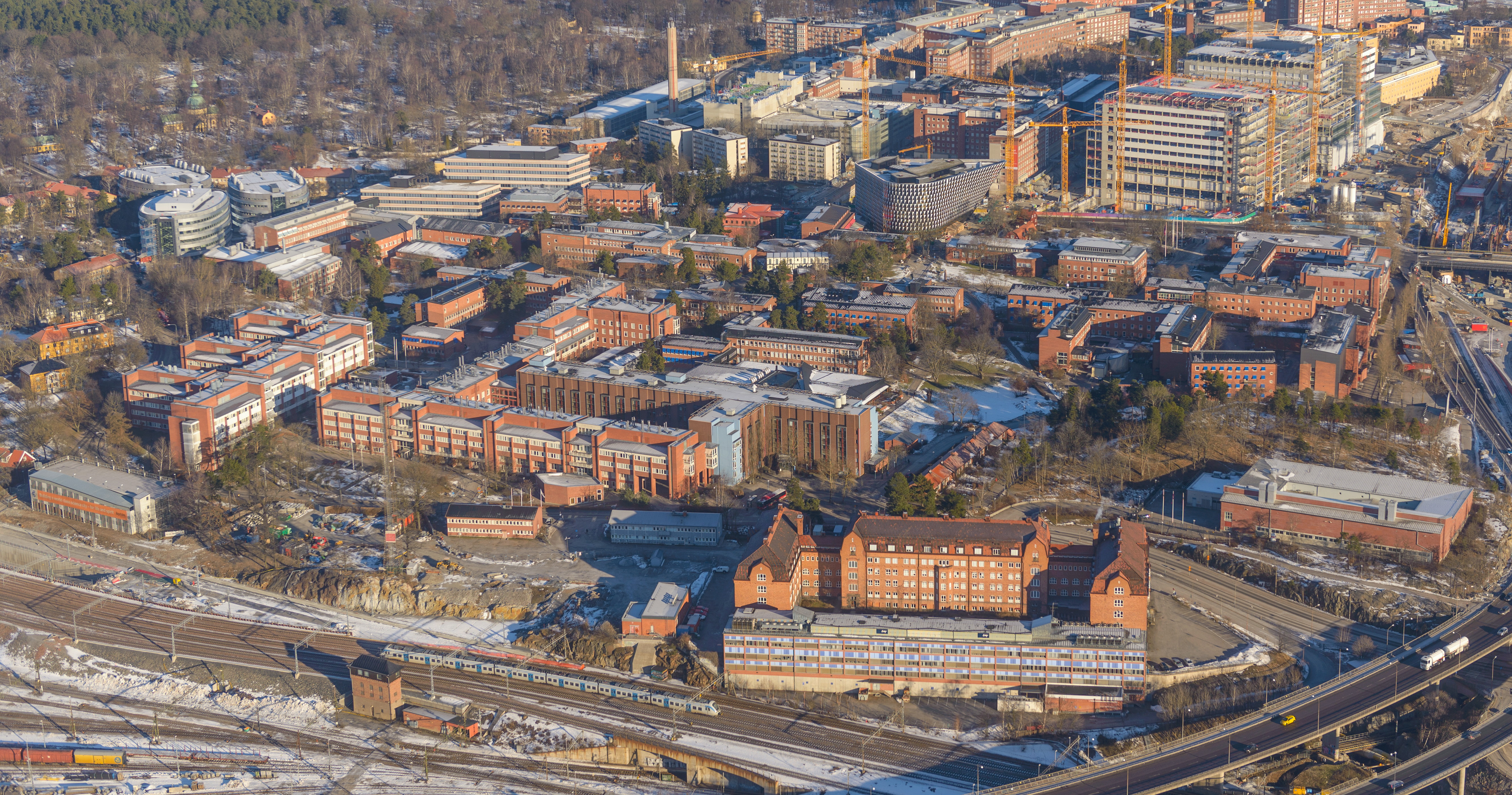 Campus Solna (Karolinska institutet)